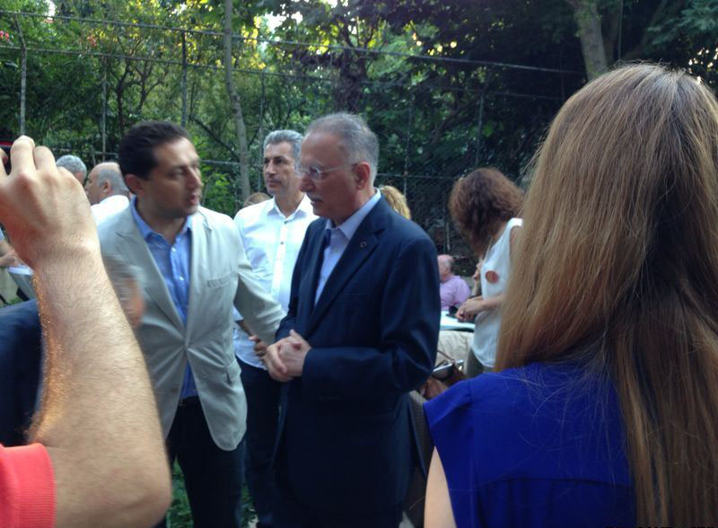 Ekmeleddin İhsanoğlu, 2014 Türkiye cumhurbaşkanlığı seçim sonuçlarını beklerken.